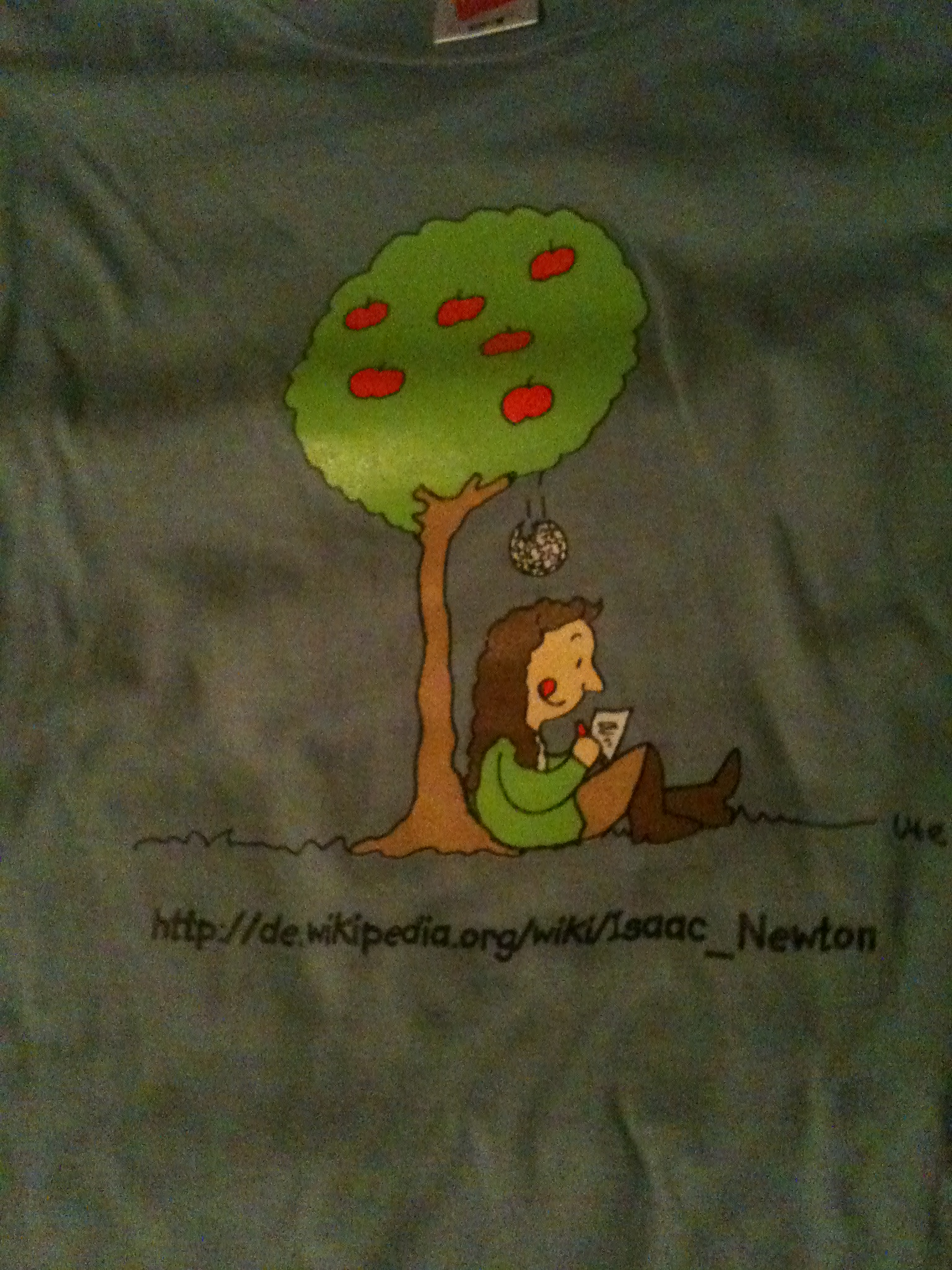 Wikipedia TShirt von wikipediaforschung.de